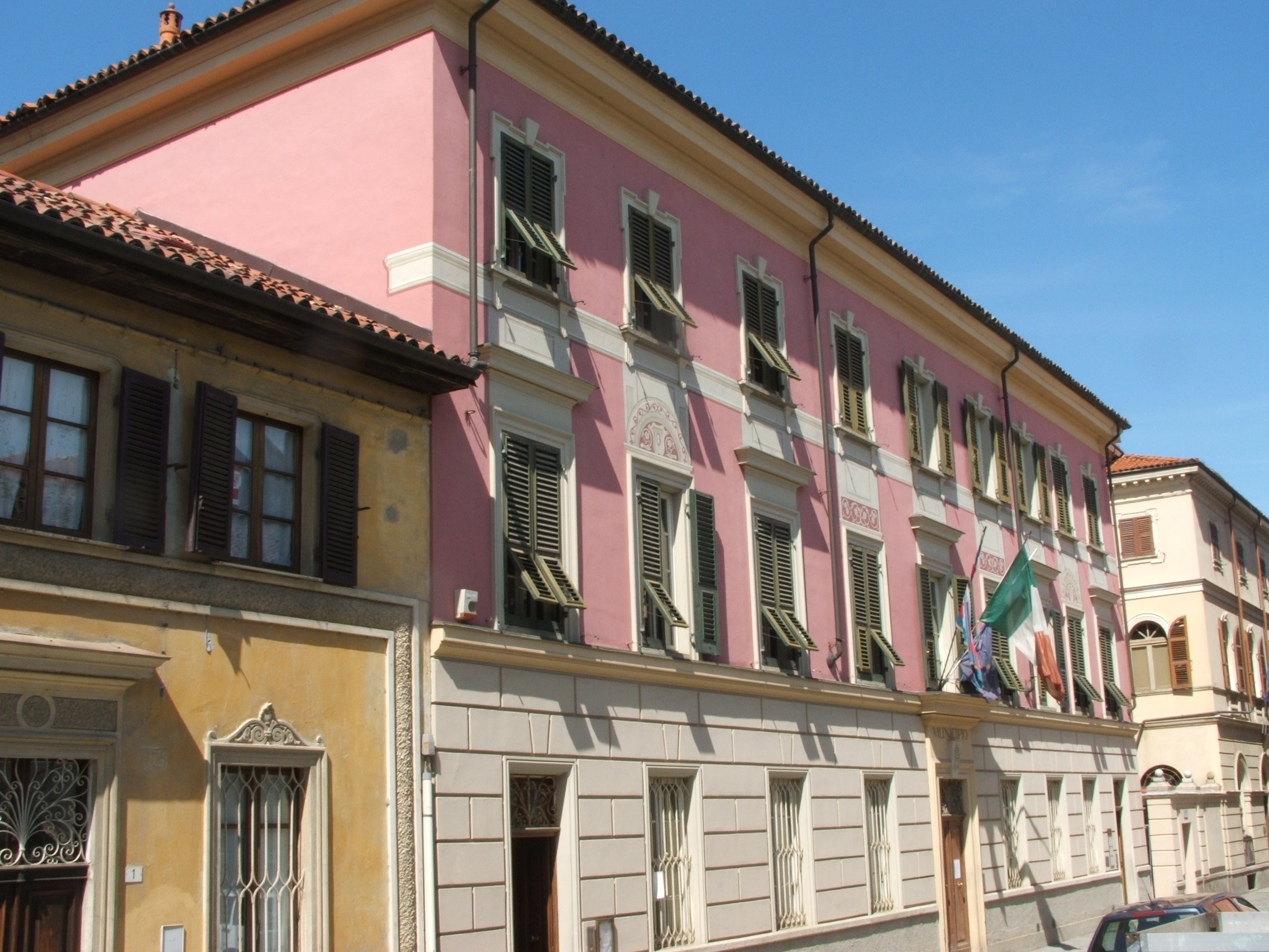 Rocca Grimalda, Alessandria, Piemonte, Italia